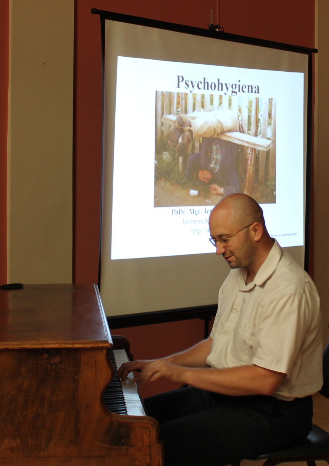 Přednáška Psychohygiena z Litoměřic L.P. 2011